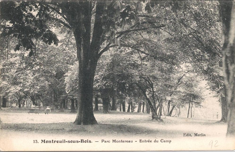 Le parc Montreau à Montreuil-sous-Bois